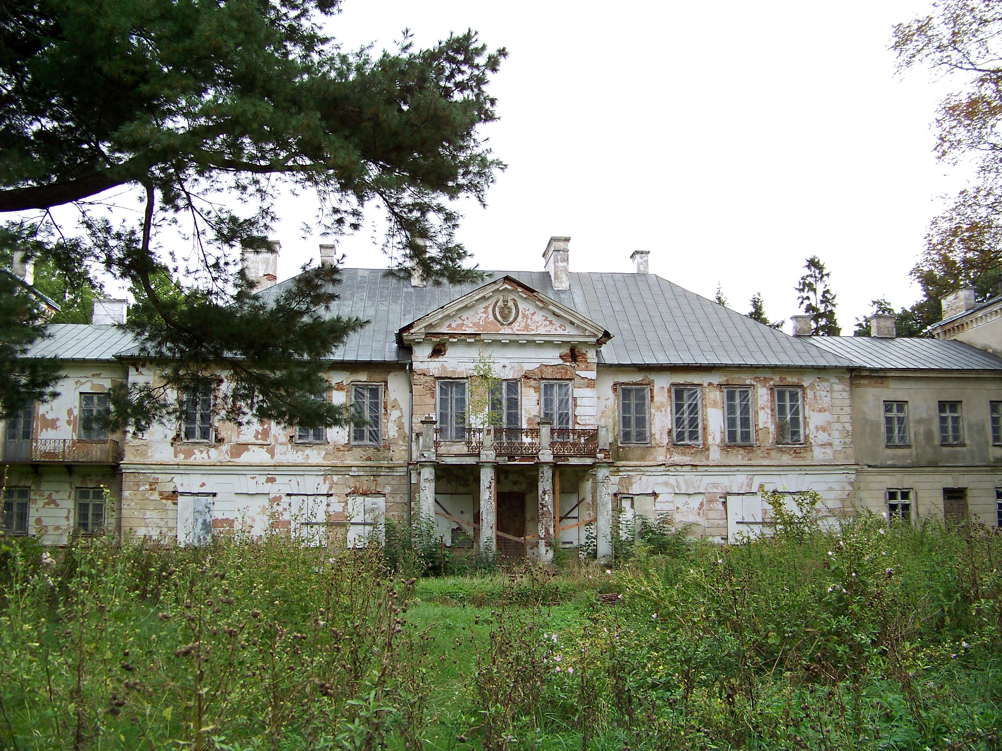 Pałac w Mordach z XVIII-XIX wieku, widok od frontu.